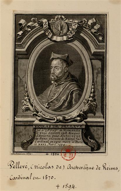 Nicolas de Pellevé (1518-1594), cardinal (1570), archevêque de Reims (1588)